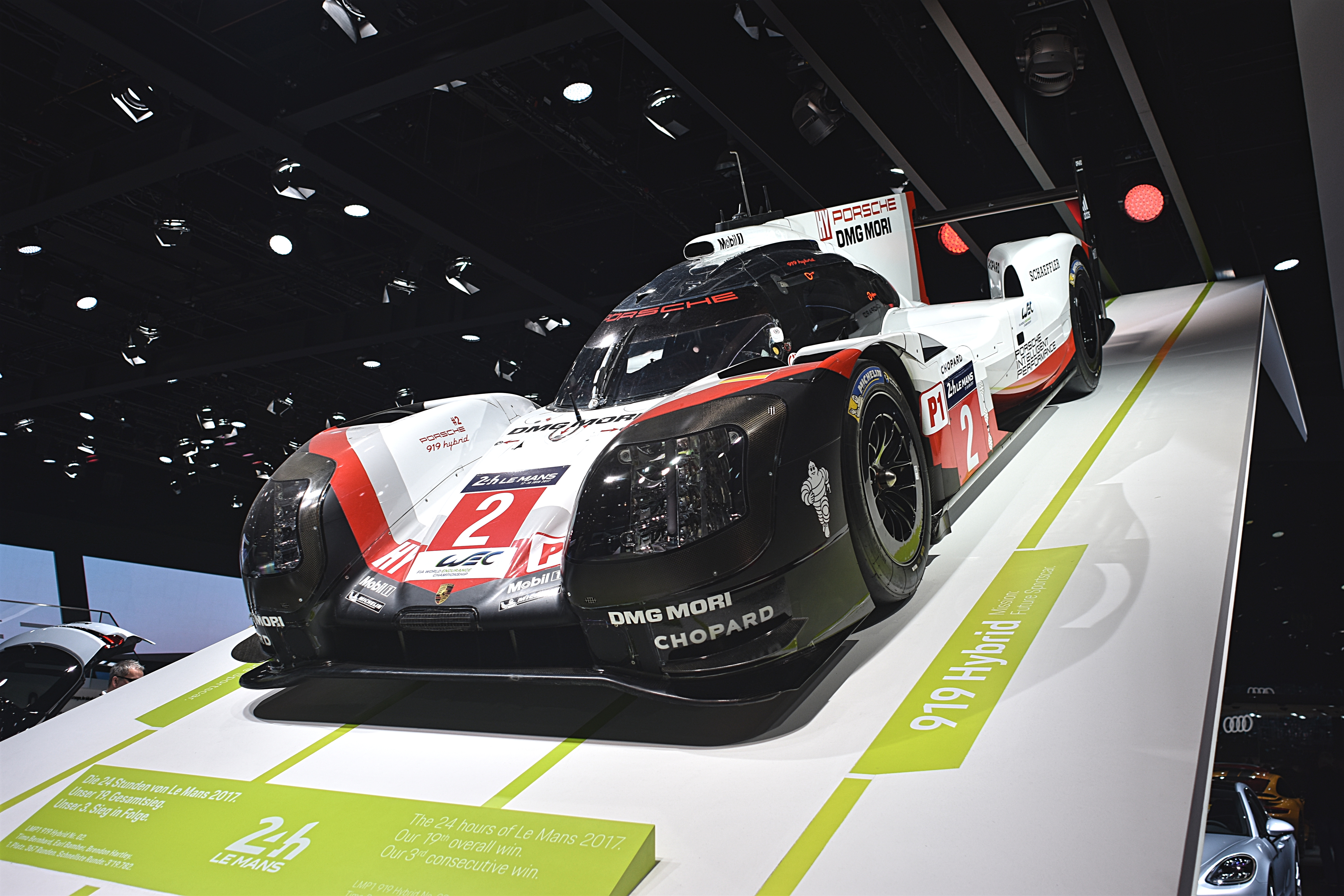 Porsche at IAA 2017